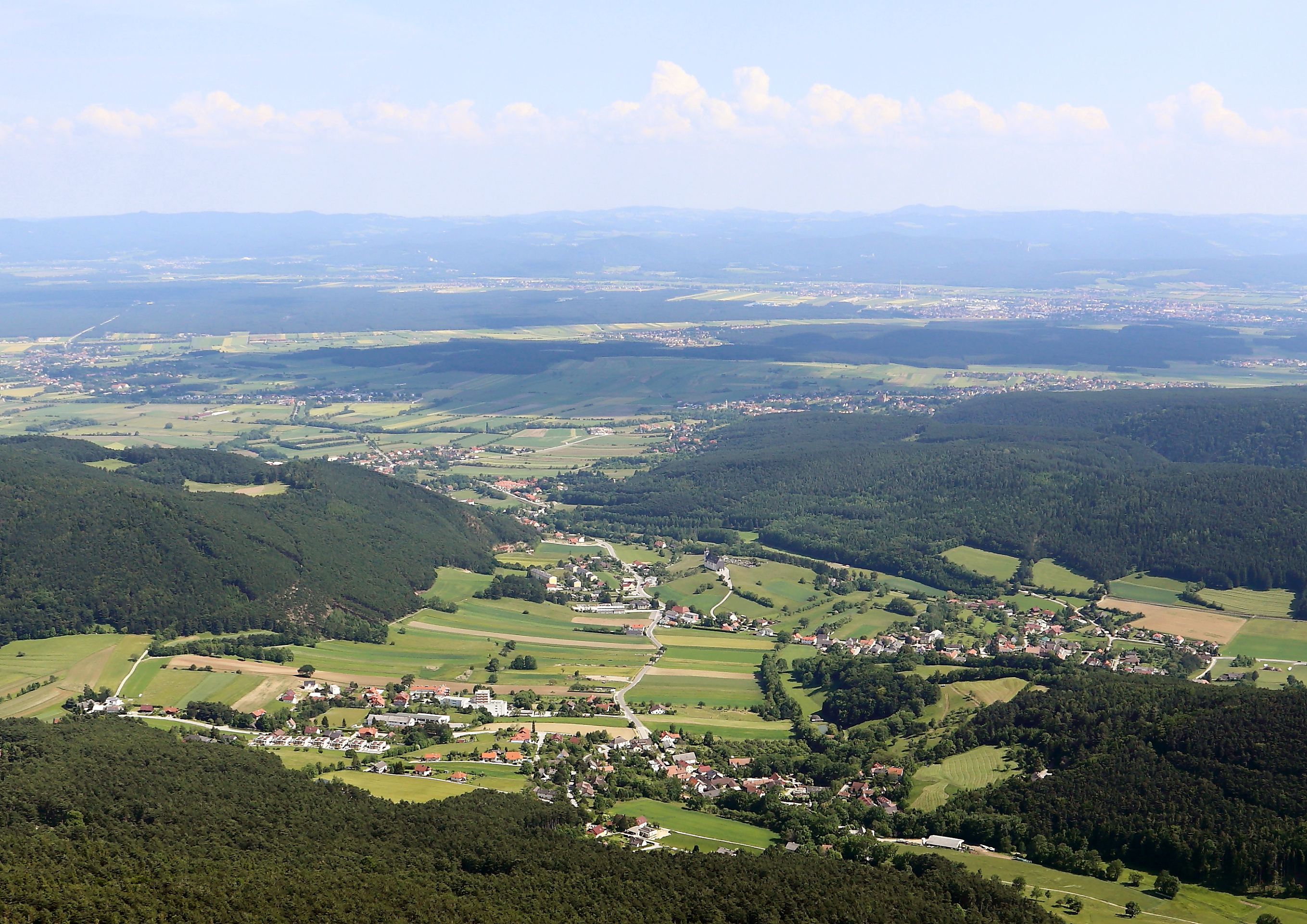 Blick von der Hohen Wand Richtung Süden mit Standort zwischen dem Hubertushaus und der Großen Kanzel. Am unteren Bildrand die Ortschaft Oberhöflein und dahinter Unterhöflein der niederösterreichischen Gemeinde Höflein an der Hohen Wand.